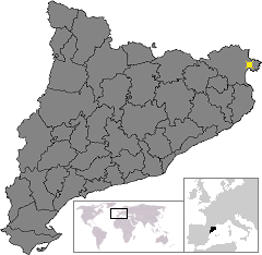 Localització de Roses. Location of Roses in Catalonia.